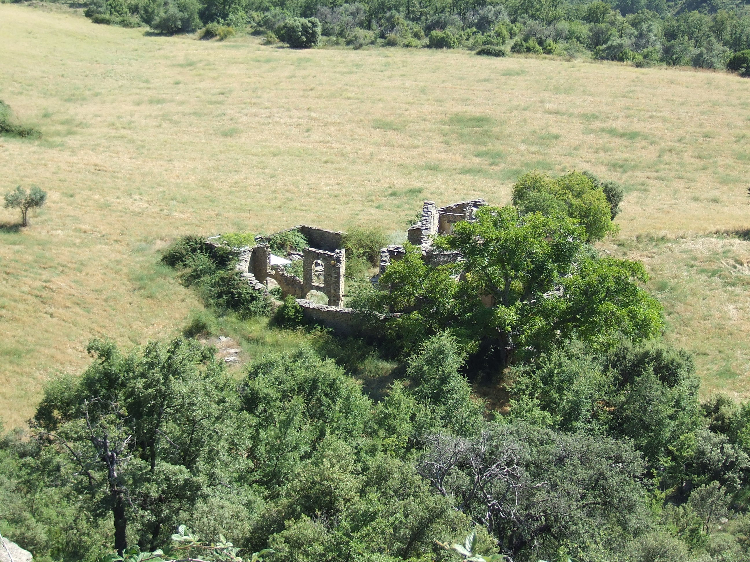 Mas de Condó (el Meüll, Mur, Castell de Mur, Pallars Jussà)